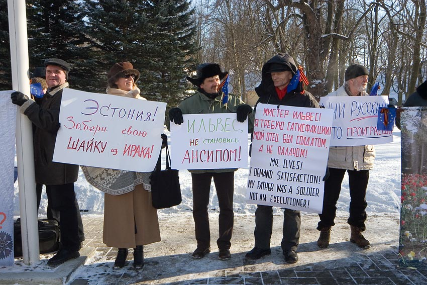 Пикет перед президентским дворцом в Кадриорге